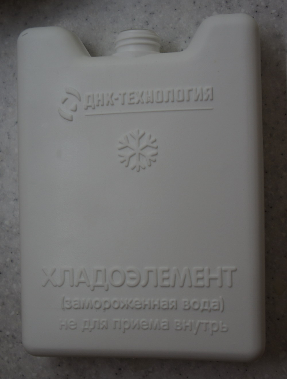 Аккумулятор холода, одна сторона